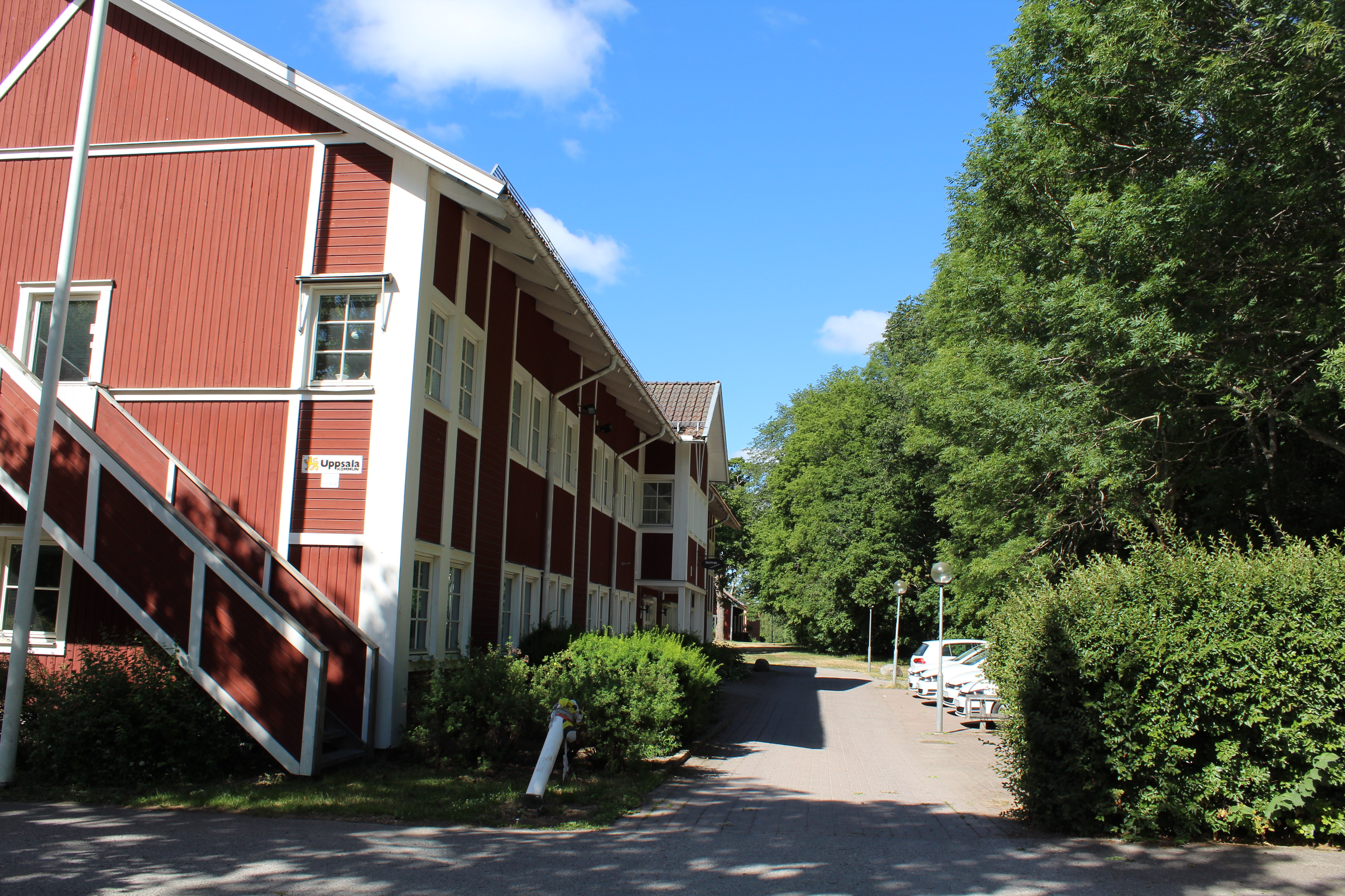 von Bahrska häcken, park i Uppsala